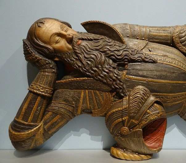 1550-1551 - 'casting model for the effigy of Mikołaj Herburt-Odnowski (+1555)' (workshop of Pankraz Labenwolf), Nürnberg, Latin Cathedral, Lviv, Germanisches Nationalmuseum, Nürnberg, Bayern, Germany